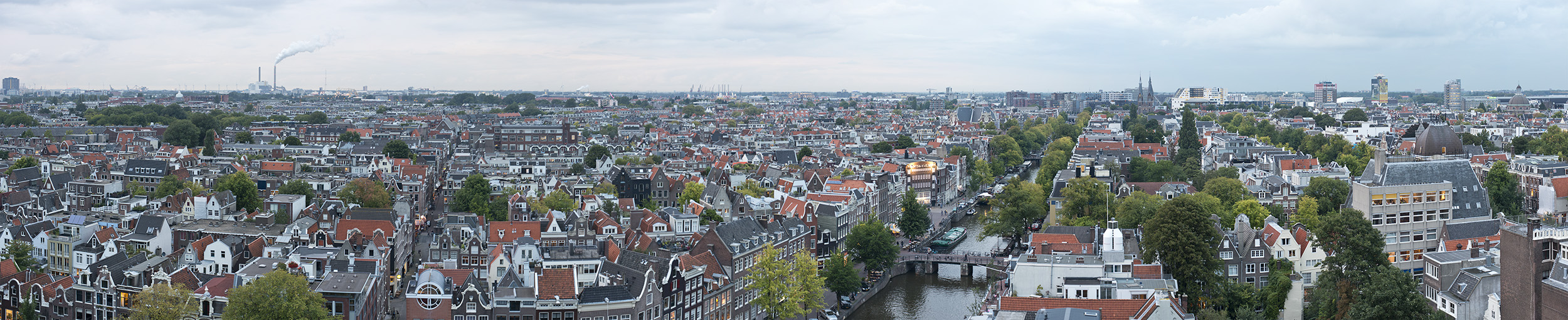 Off Westerkerk